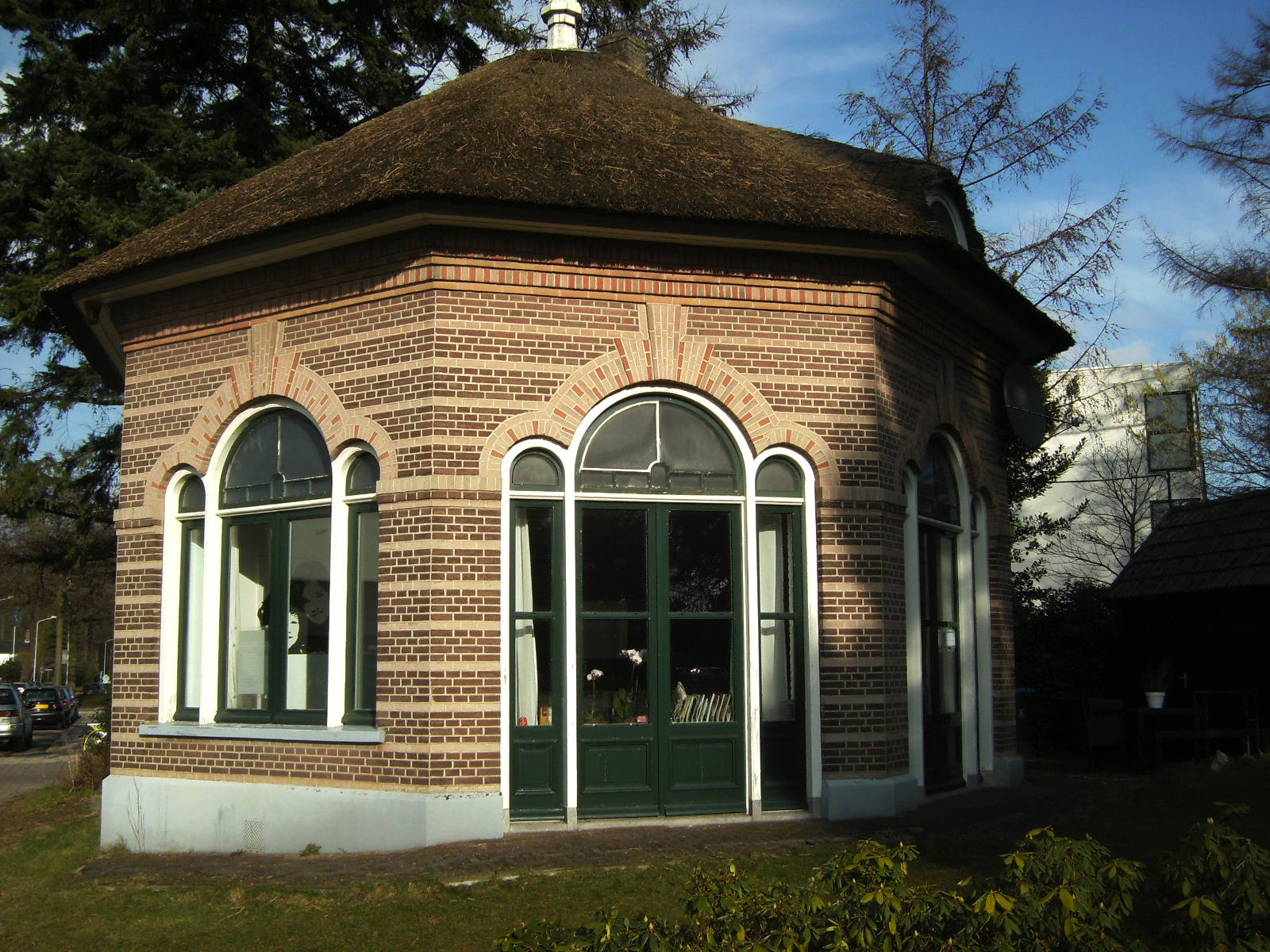 Theekoepel uit circa 1905 behorend bij Villa Ruimzicht te Doetinchem